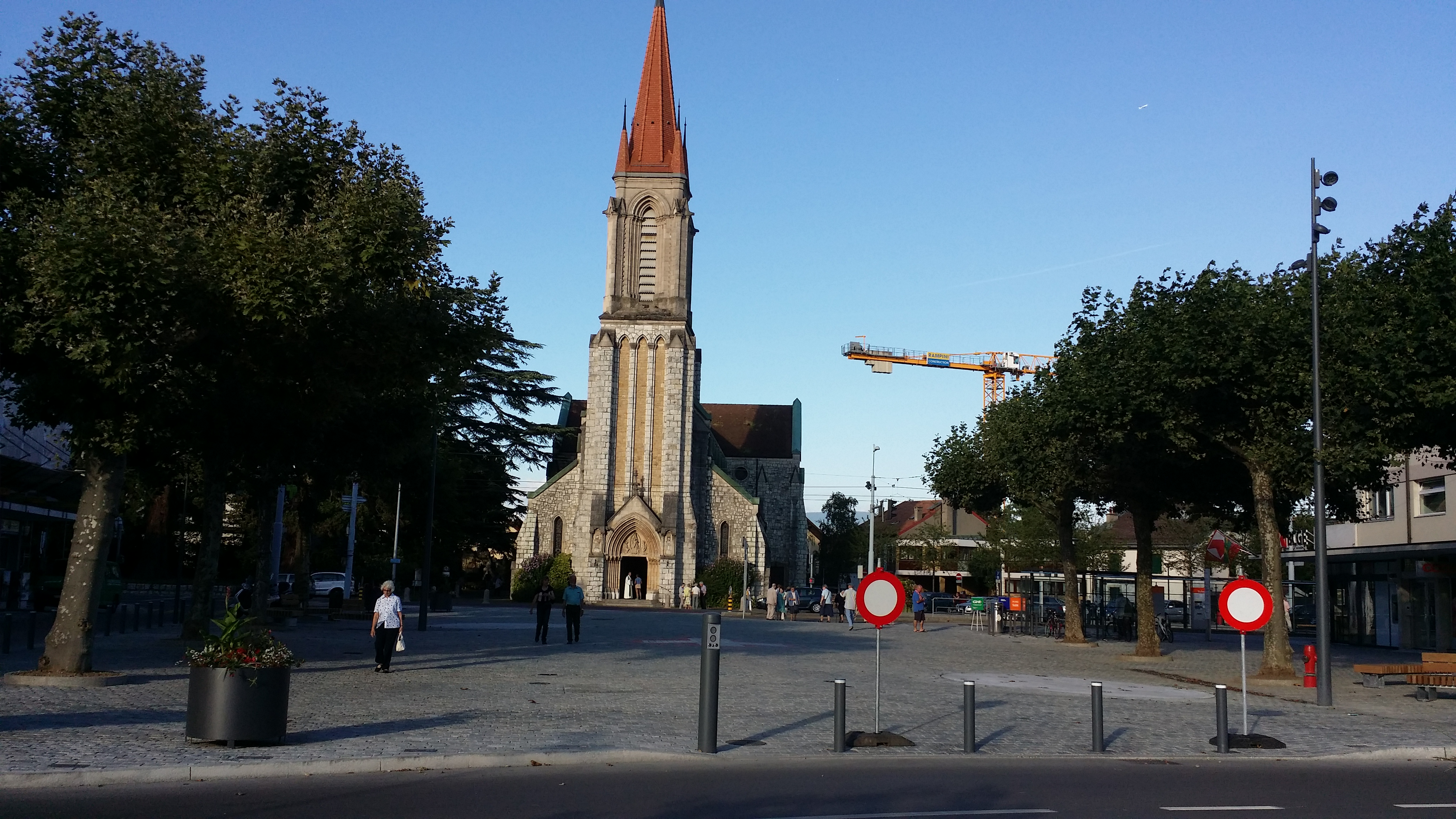 Église Notre-Dame des Grâces (Lancy)